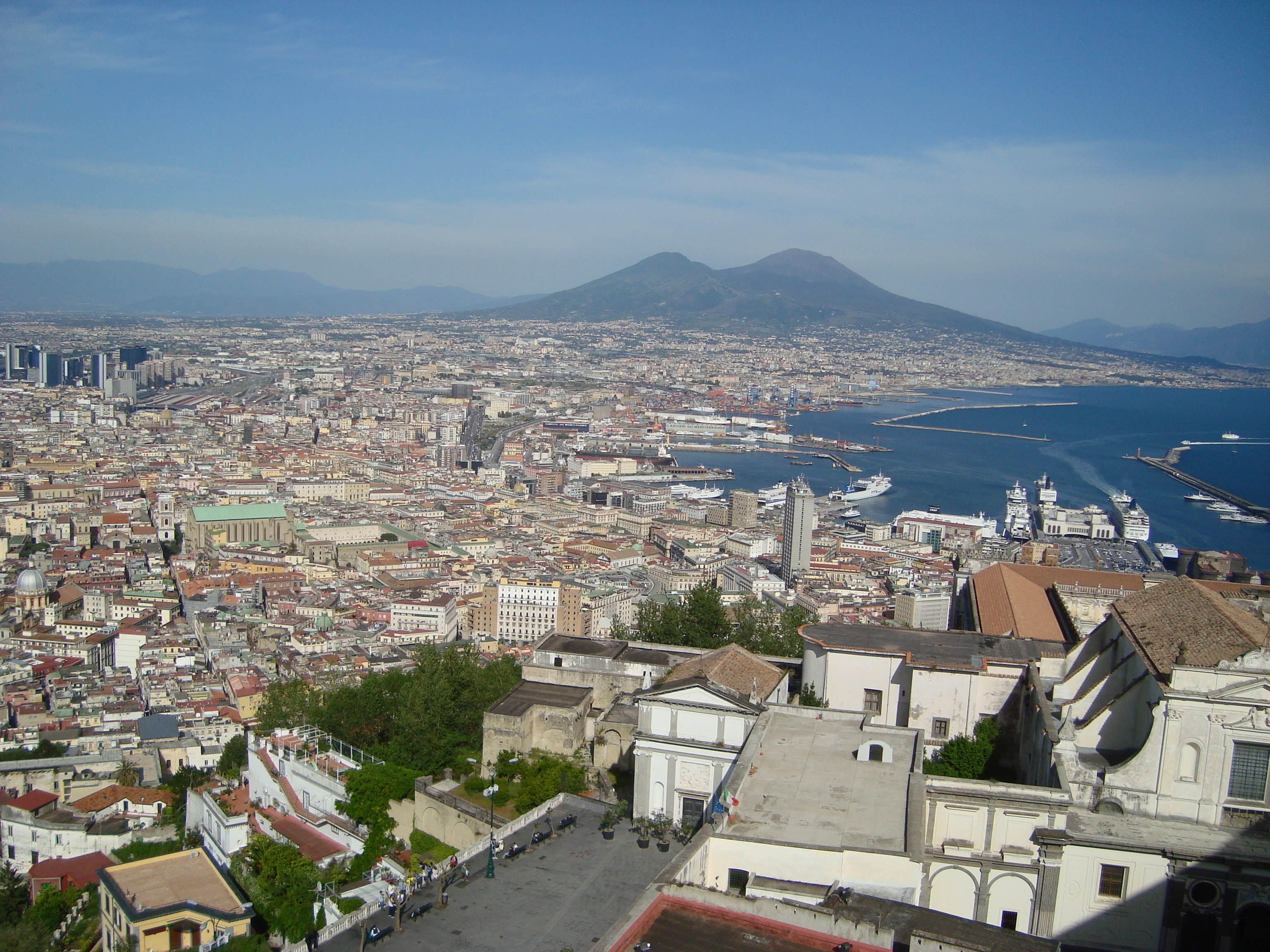 Vesuv, pohled z Neapole